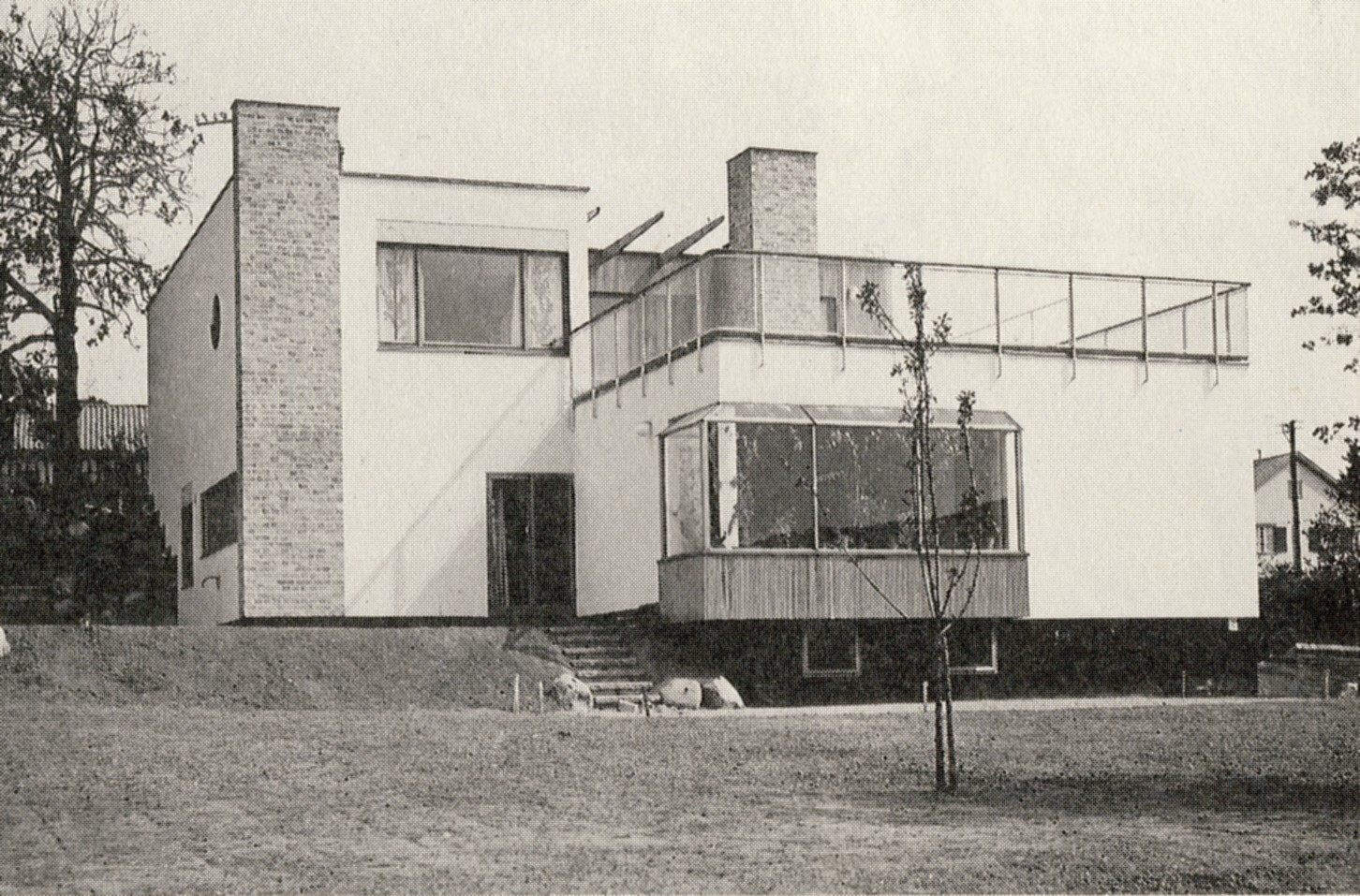 Alva och Gunnar Myrdals villa i Bromma, Stockholm. Arkitekt Sven Markelius 1937